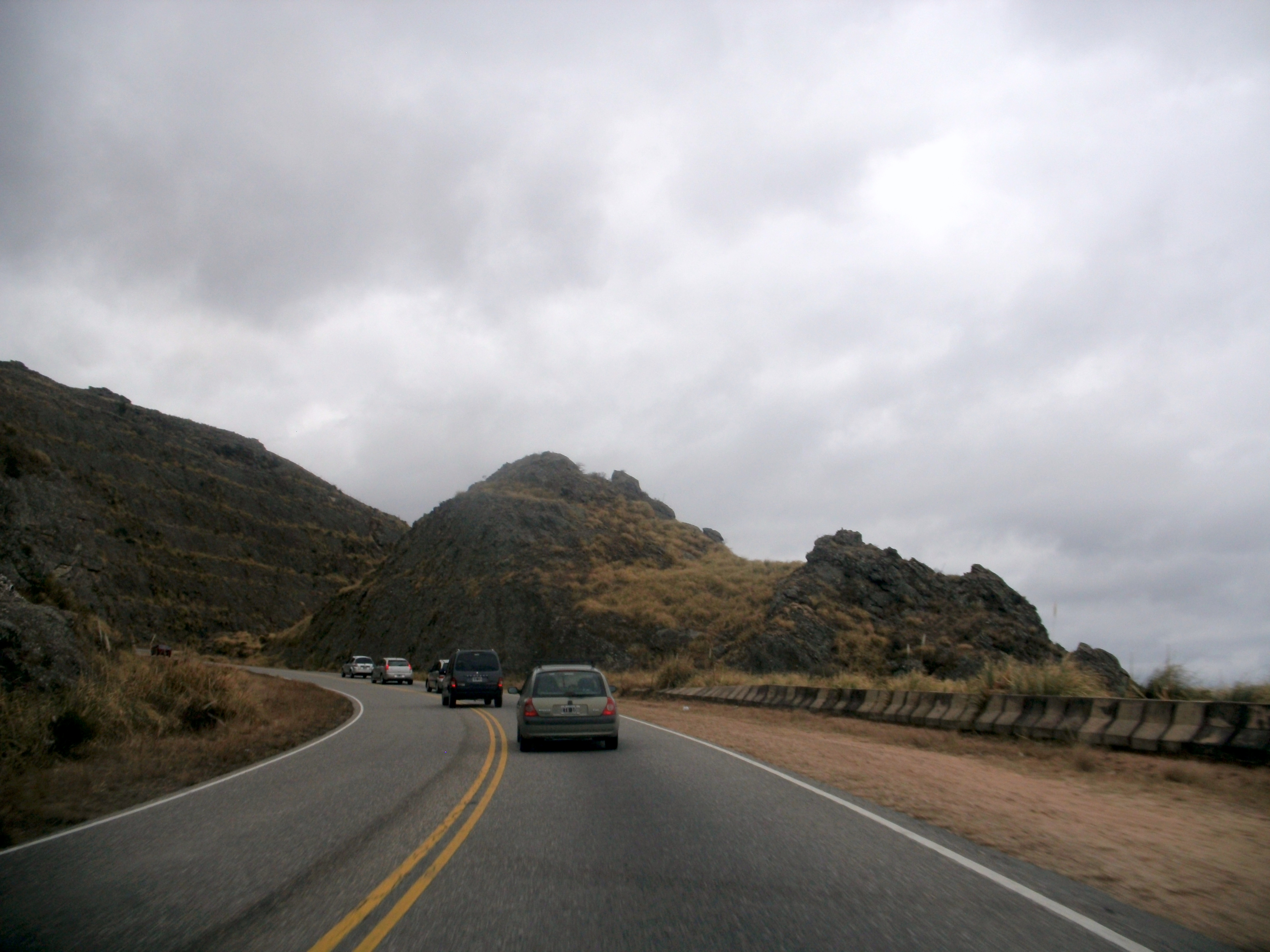 La ruta provincial ascendiendo sobre las sierras